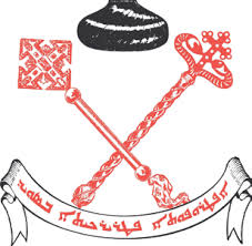 Emblem för Patriarkaliska ställföreträdarskapet för Syrisk-ortodoxa kyrkan i Sverige